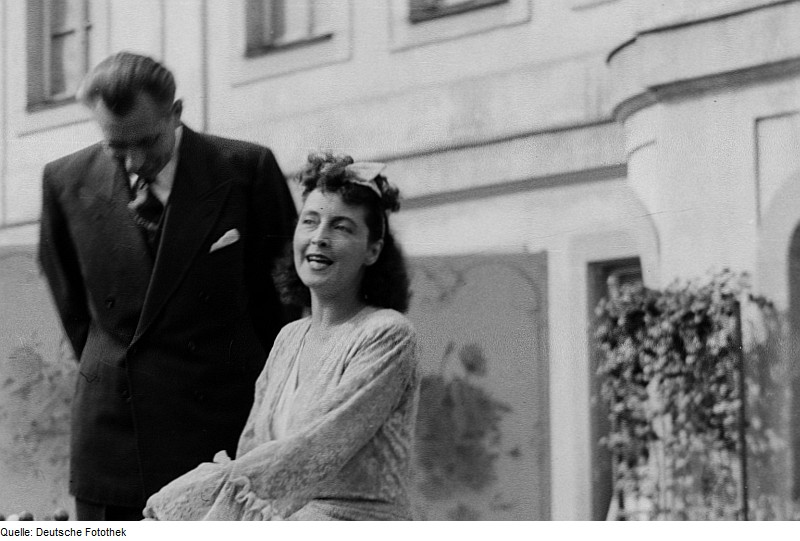 Original image description from the Deutsche FotothekPortrait Dorothea Wiecks vorm Gohliser Schlößchen